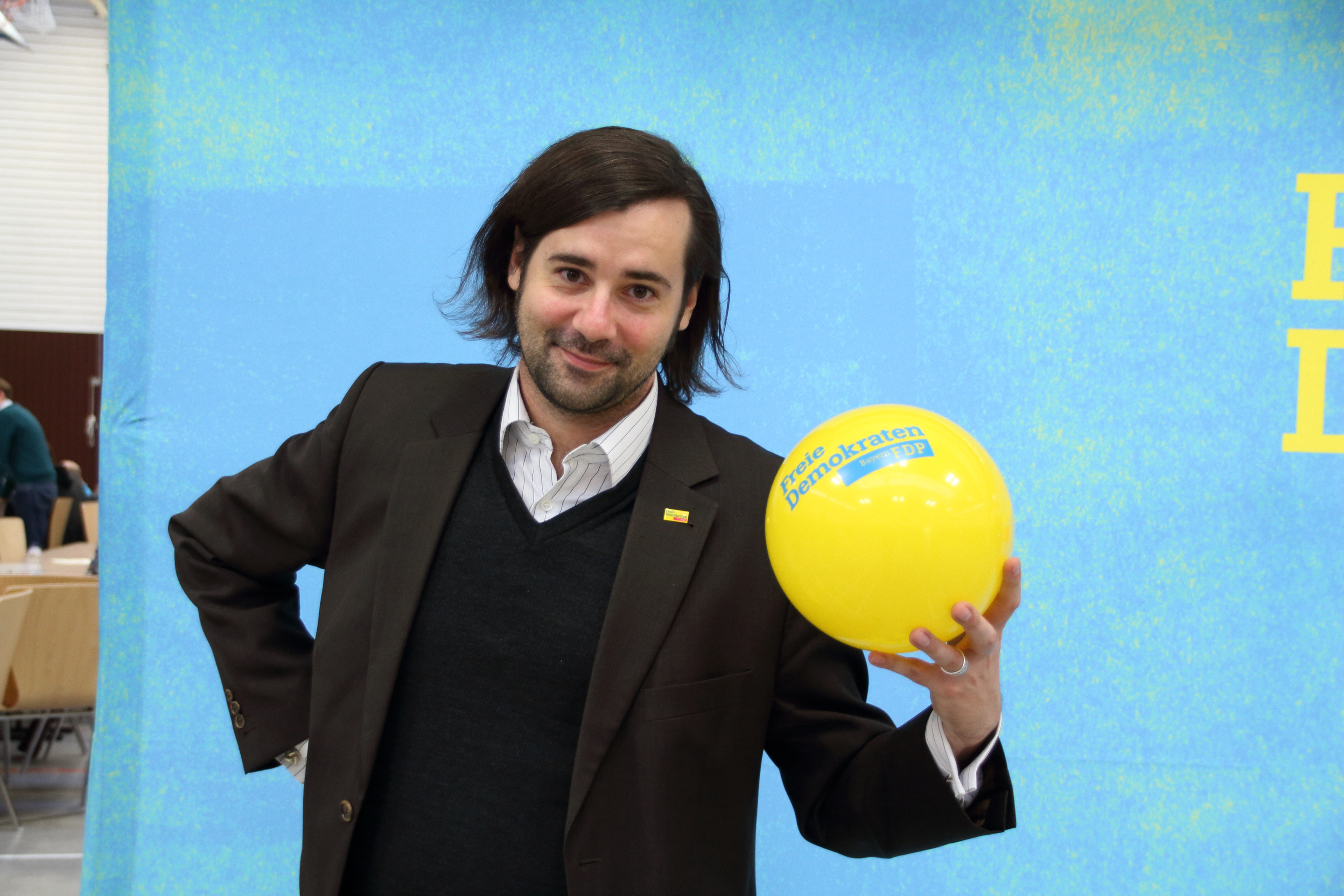 Sebastian Körber beim bayrischen LandesparteitagDepicted person: Sebastian Körber – German architect and politician